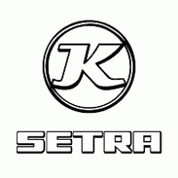 Logotipo da empresa